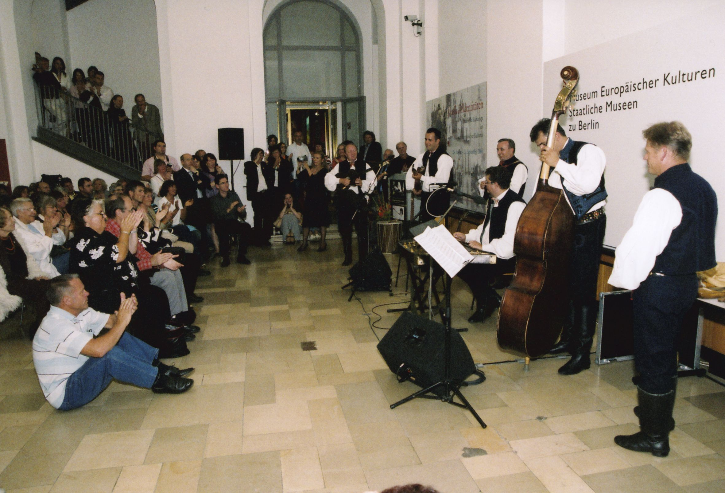 Die Kroatischen Kulturtage aus der Reihe: "Kulturtage im Museum Europäischer Kulturen"